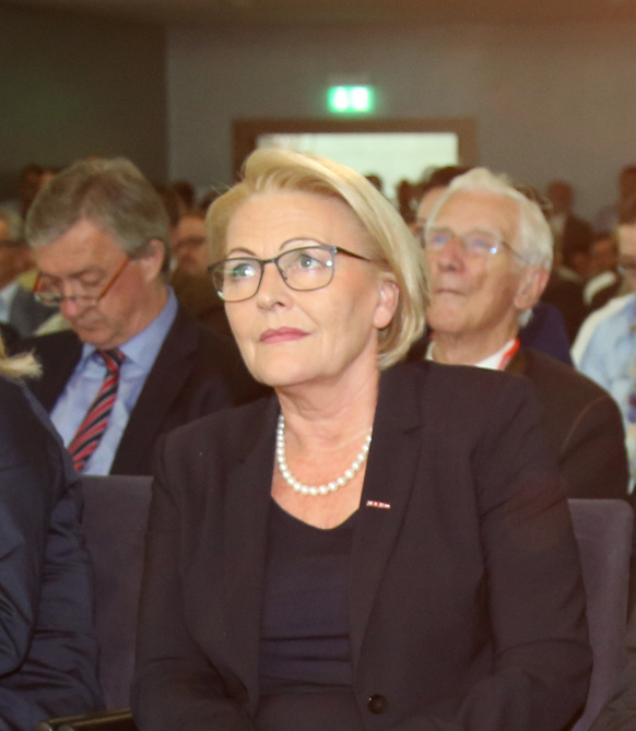 Gierlinger_Bernadette-3258